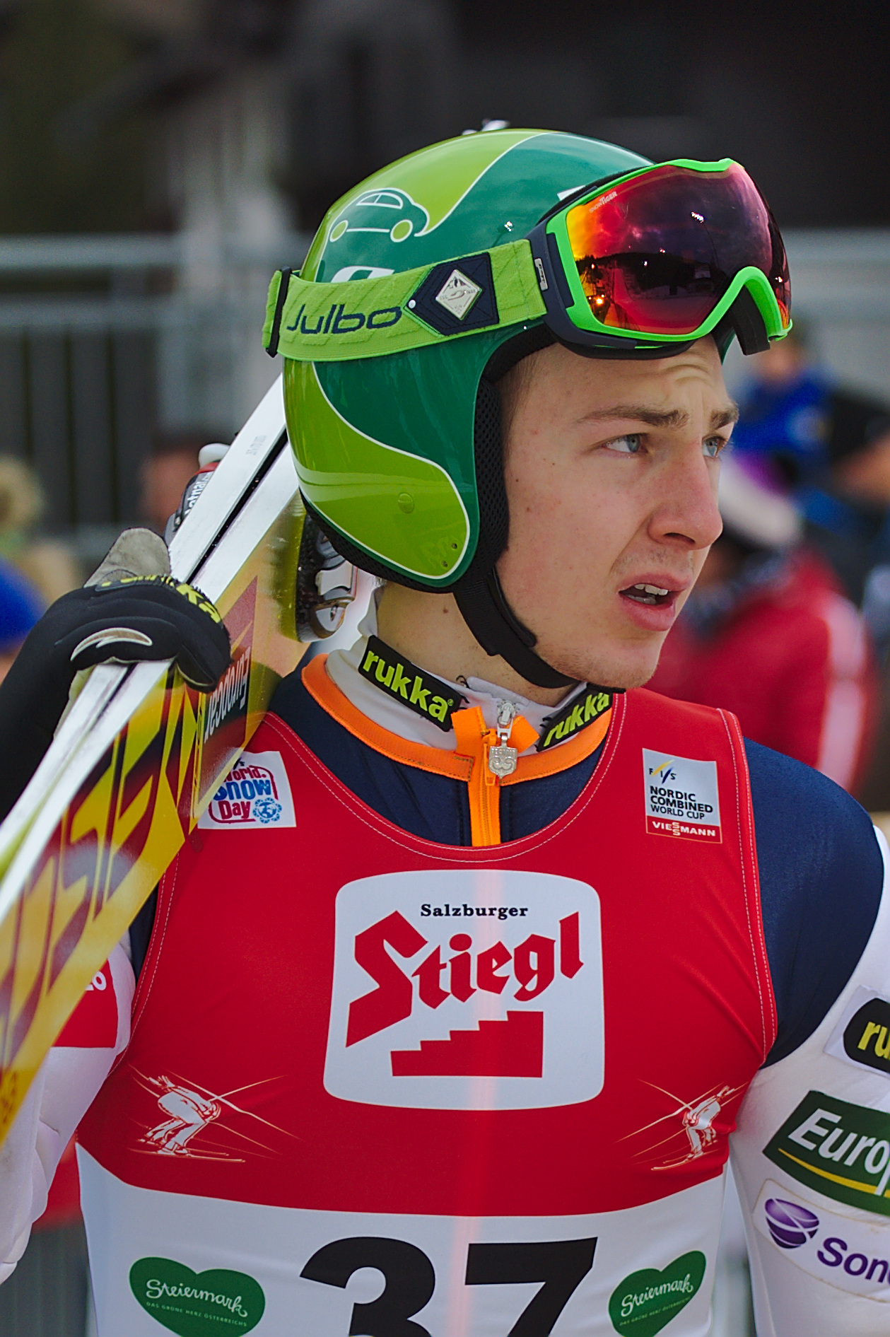 Ilkka Herola (FIN)